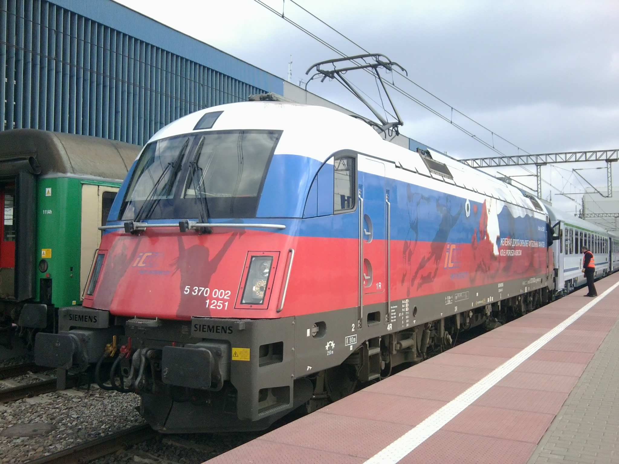 Lokomotywa EU44 oklejona w barwy Rosjii na czas trwania EURO 2012.